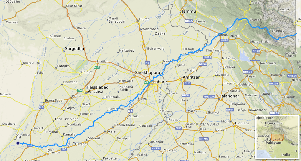 carte réalisée sur umap, [1] This map may be incomplete, and may contain errors. Don't rely solely on it for navigation.